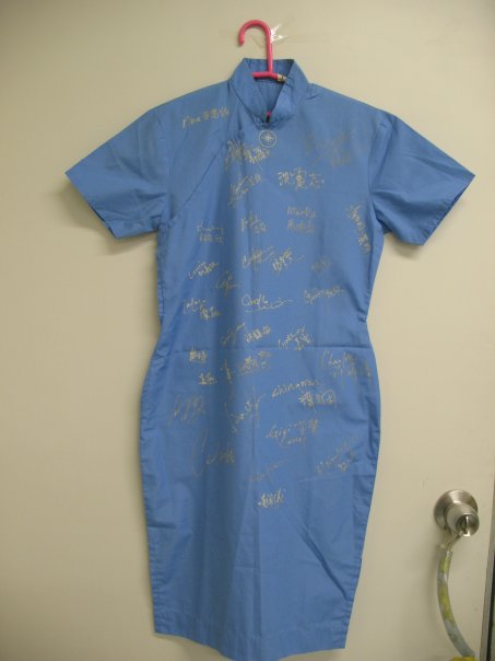 中文（香港）: 長衫式樣的香港女學生校服，正面滿是同學們的簽名。